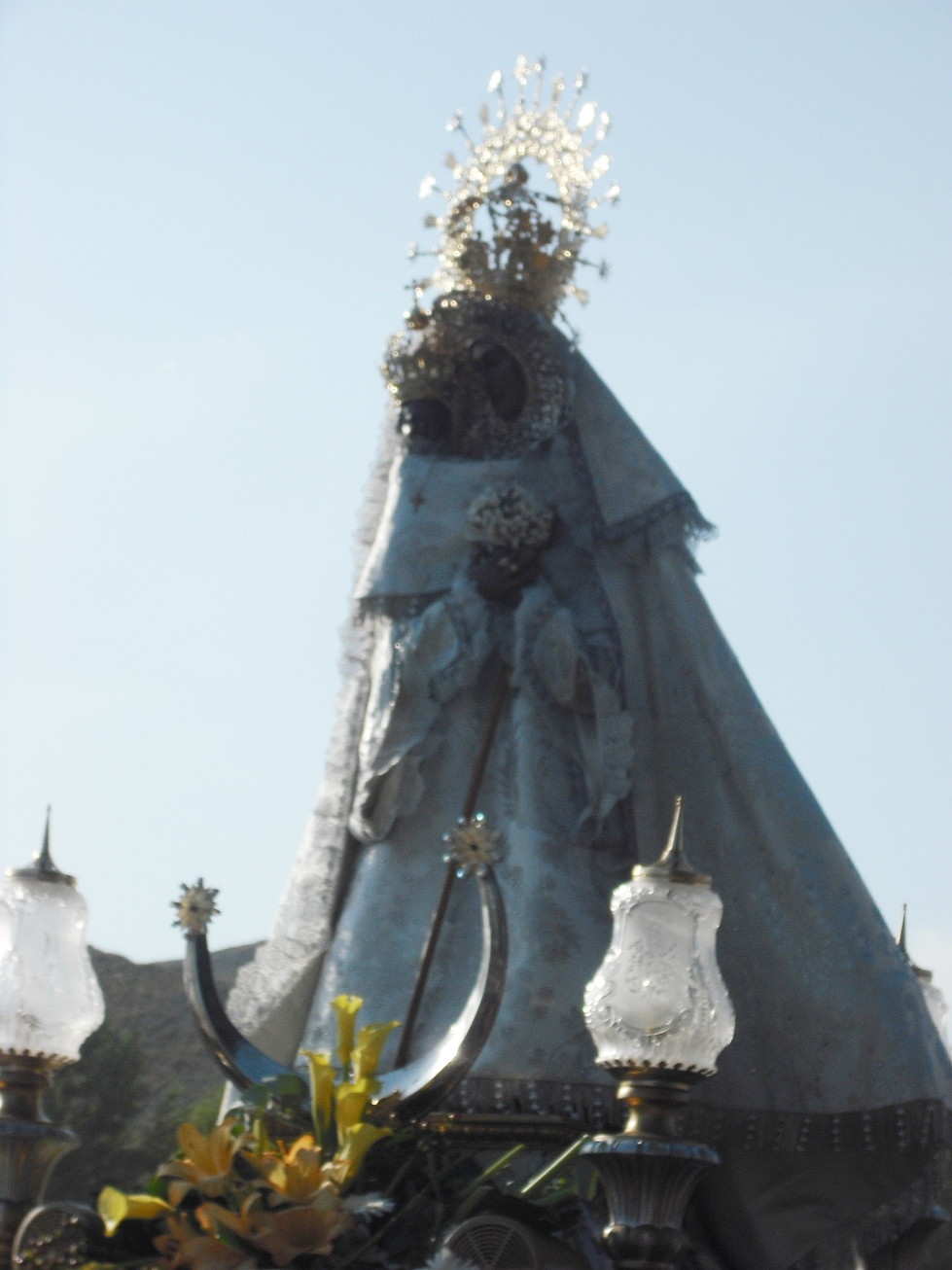 Nuestra Señora de las Virtudes llevada en romería hacia la ciudad de Villena.